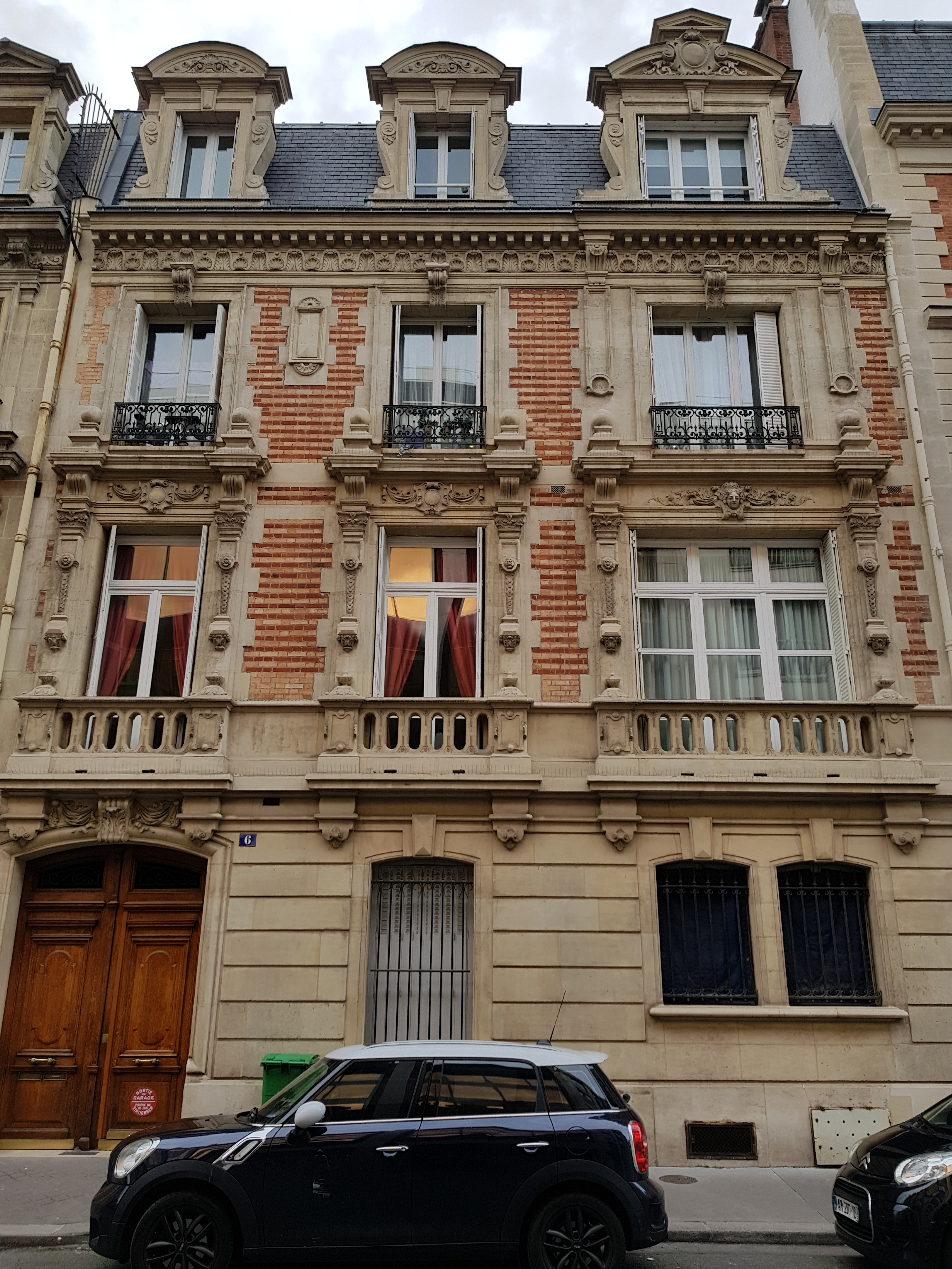 Hôtel particulier Lepel-Cointet, 6 rue Dumont-d'Urville, Paris 16e.